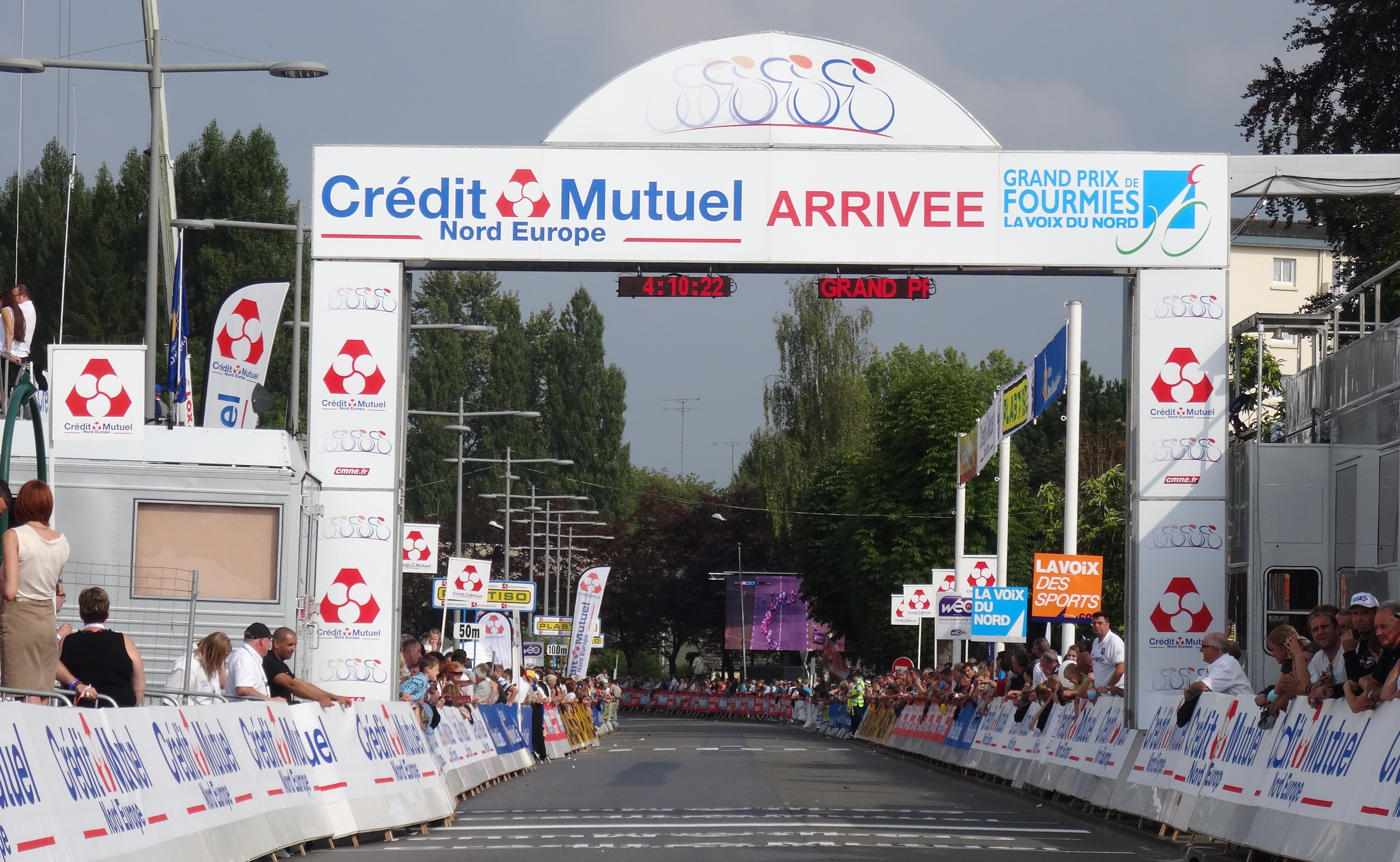 Reportage photographique réalisé le dimanche 7 septembre à l'occasion du départ et de l'arrivée du Grand Prix de Fourmies 2014 à Fourmies, Nord-Pas-de-Calais, France.